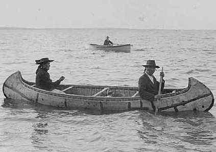 Jimaan 1910